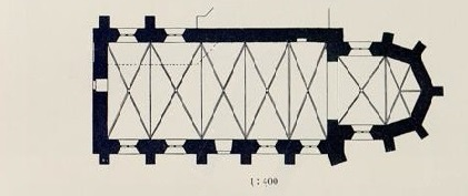 Grundriss der Klosterkirche Himmelpforten (Ense, Kreis Soest)